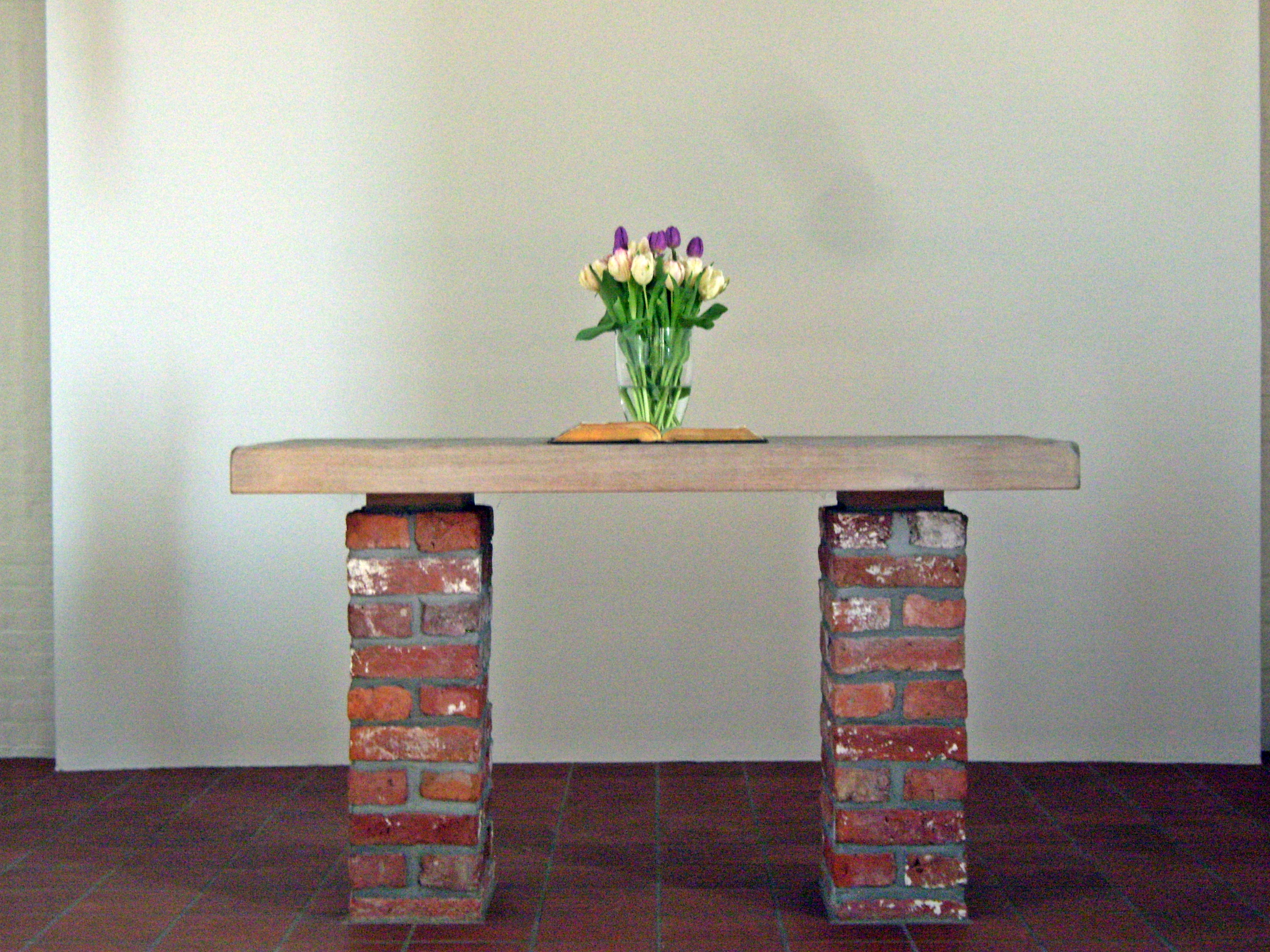 Altar aus mittelalterlichen Munksteenen, gefunden in den Dünen von List. Im Kulturdenkmal Jürgenkirche List